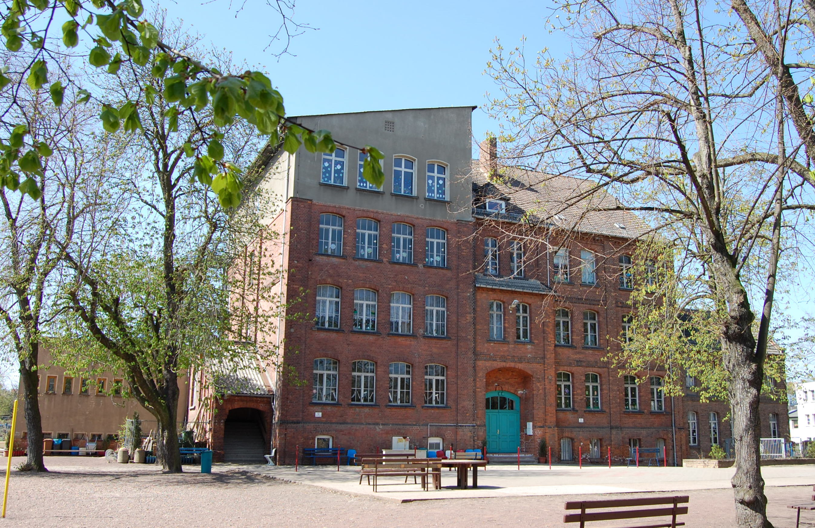 Grundschule Westerhüsen, Blick von der Hubertusstraße